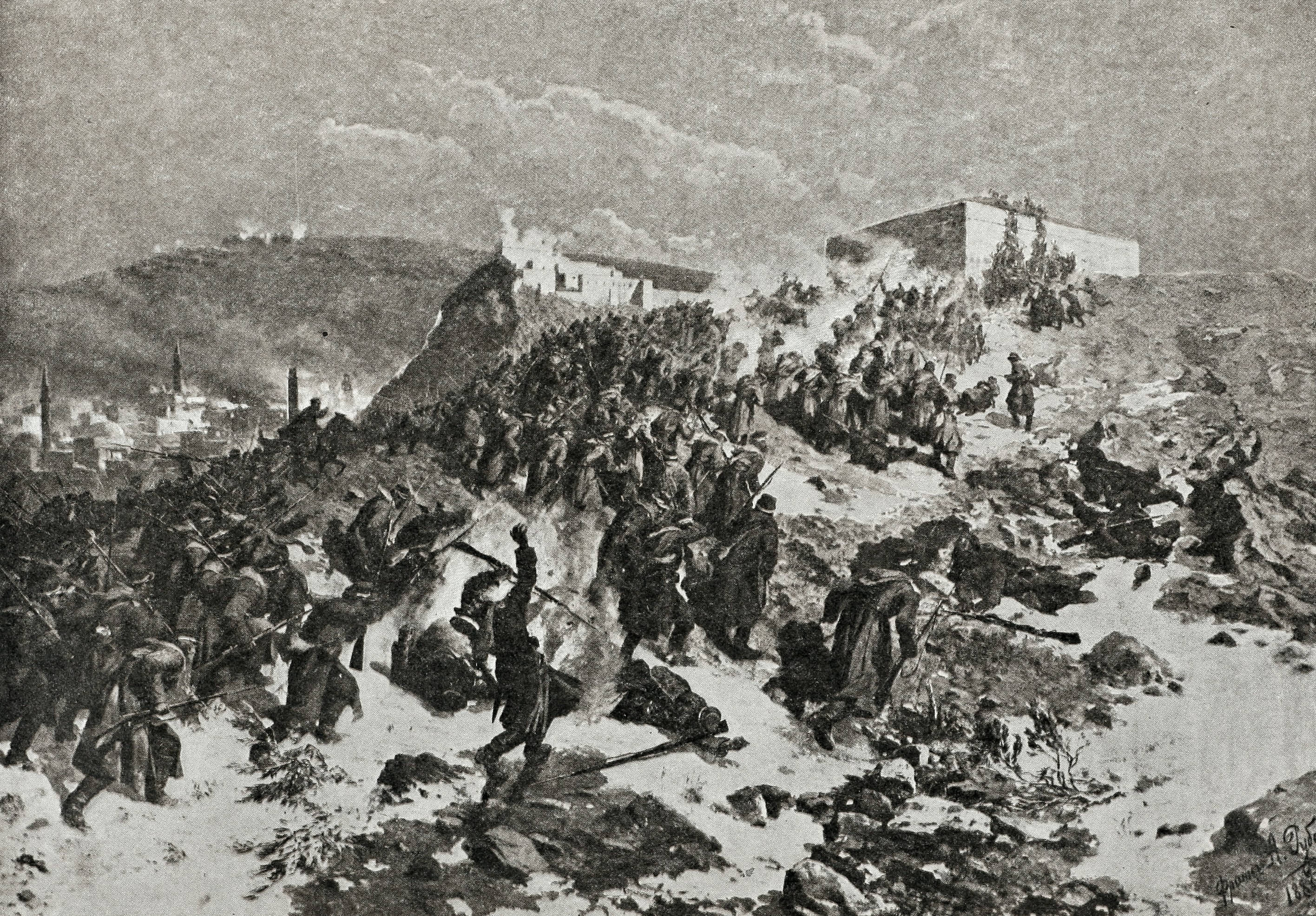 Штурм Карса в 1877 году. Это изображение было использовано для иллюстрирования статьи «Карс» опубликованной в двенадцатом томе «Военной энциклопедии», который был издан книгоиздательским товариществом И. Д. Сытина в 1913 году в столице Российской империи городе Санкт-Петербурге. Более подробное описание к этой картинке можно прочесть в указанной выше статье.